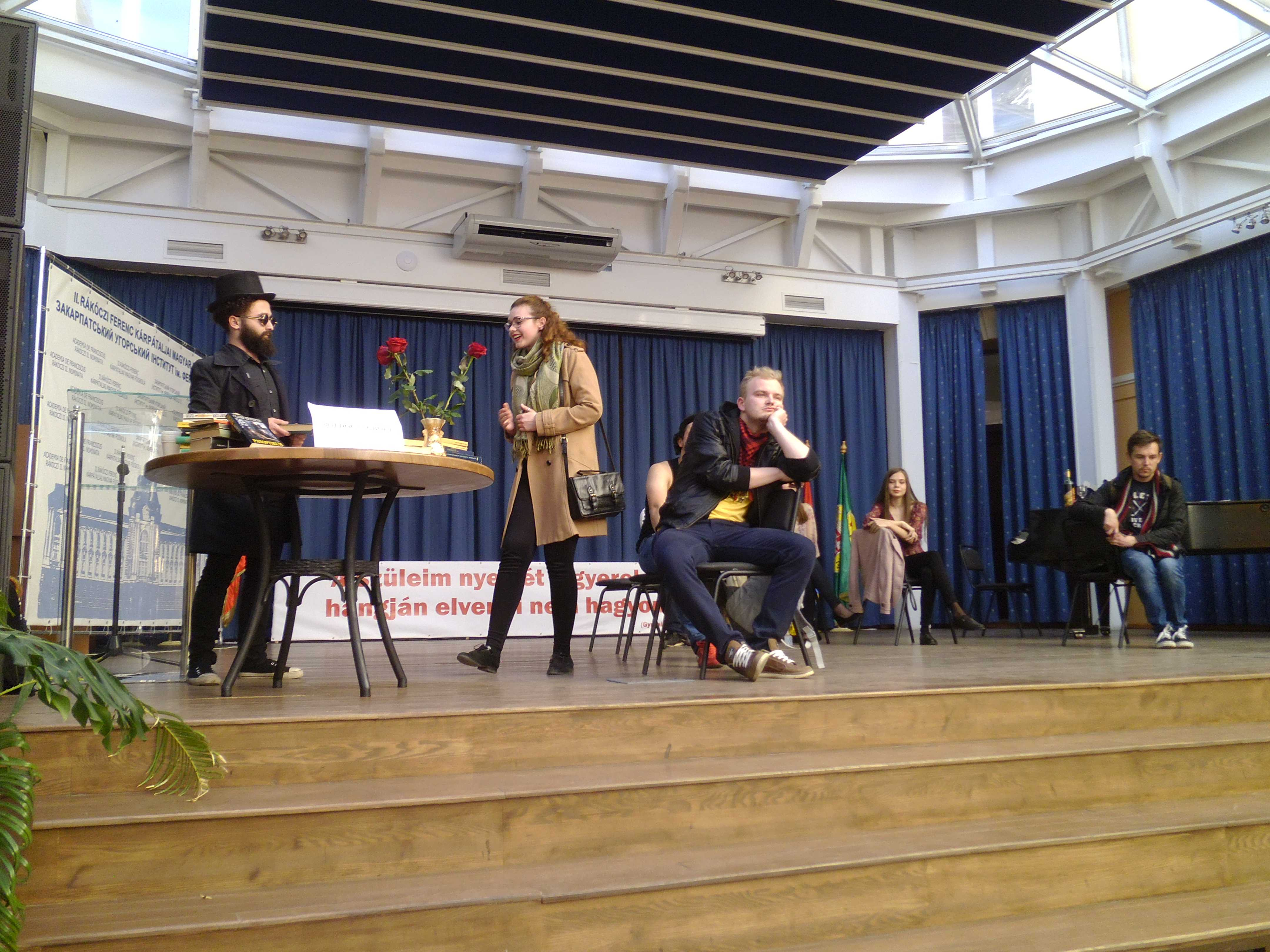 A Boldogságbolt előadása Kárpátalján